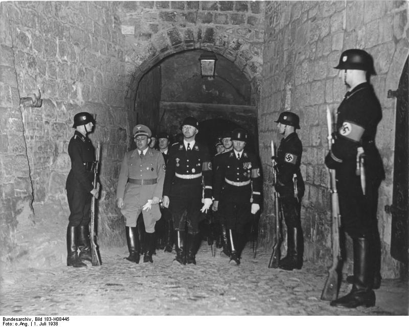 Heinrichs Feier in Quedlinburg Anlässlich des Todestages von Heinrich I. fand am 1. Juli wie in den Vorjahren, eine nächtliche Feierstunde statt. UBz: Der Reichführer SS (Mitte) Gauleiter und Reichsstatthalter Jordan (links) und Obergruppenführer Heissmeyer begeben sich um 24 Uhr zum Dom. Fot.: Ho 2.7.38